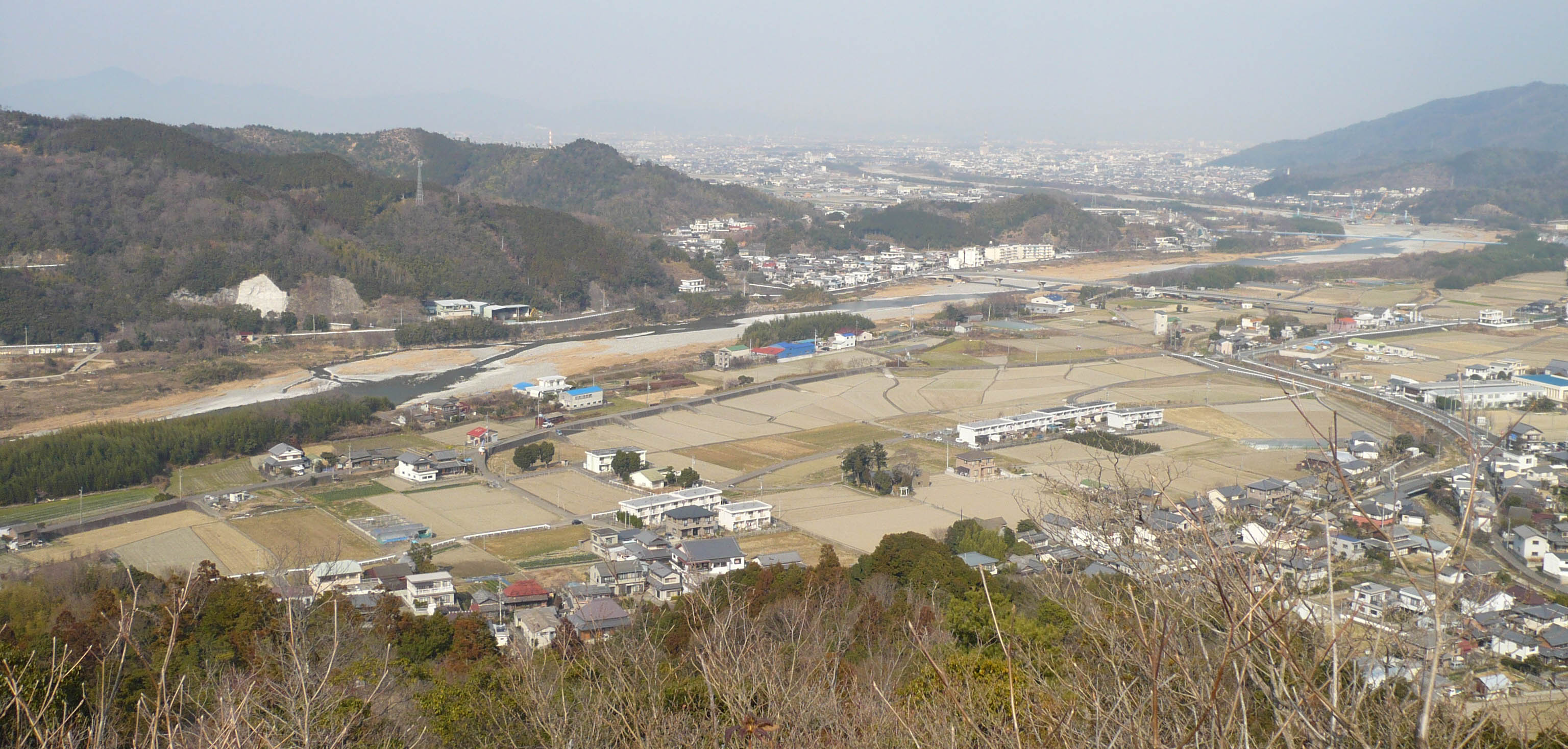 明神丸からの眺望